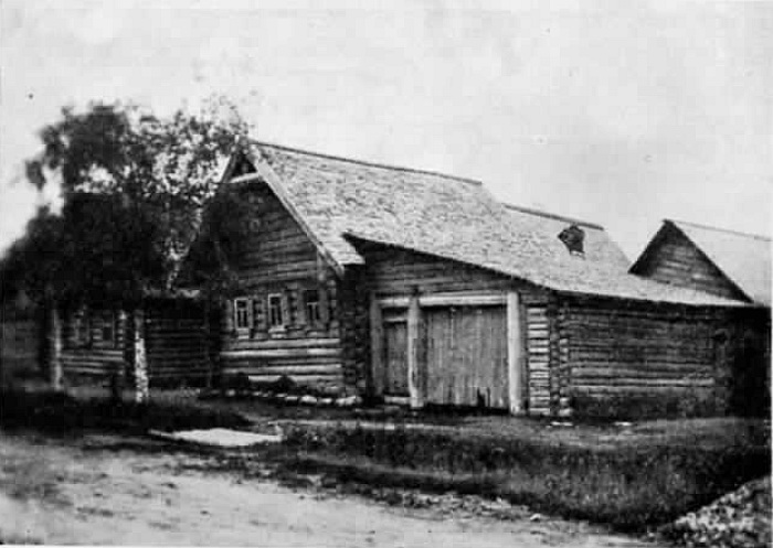 Деревня Поги прихода Лииссиля.